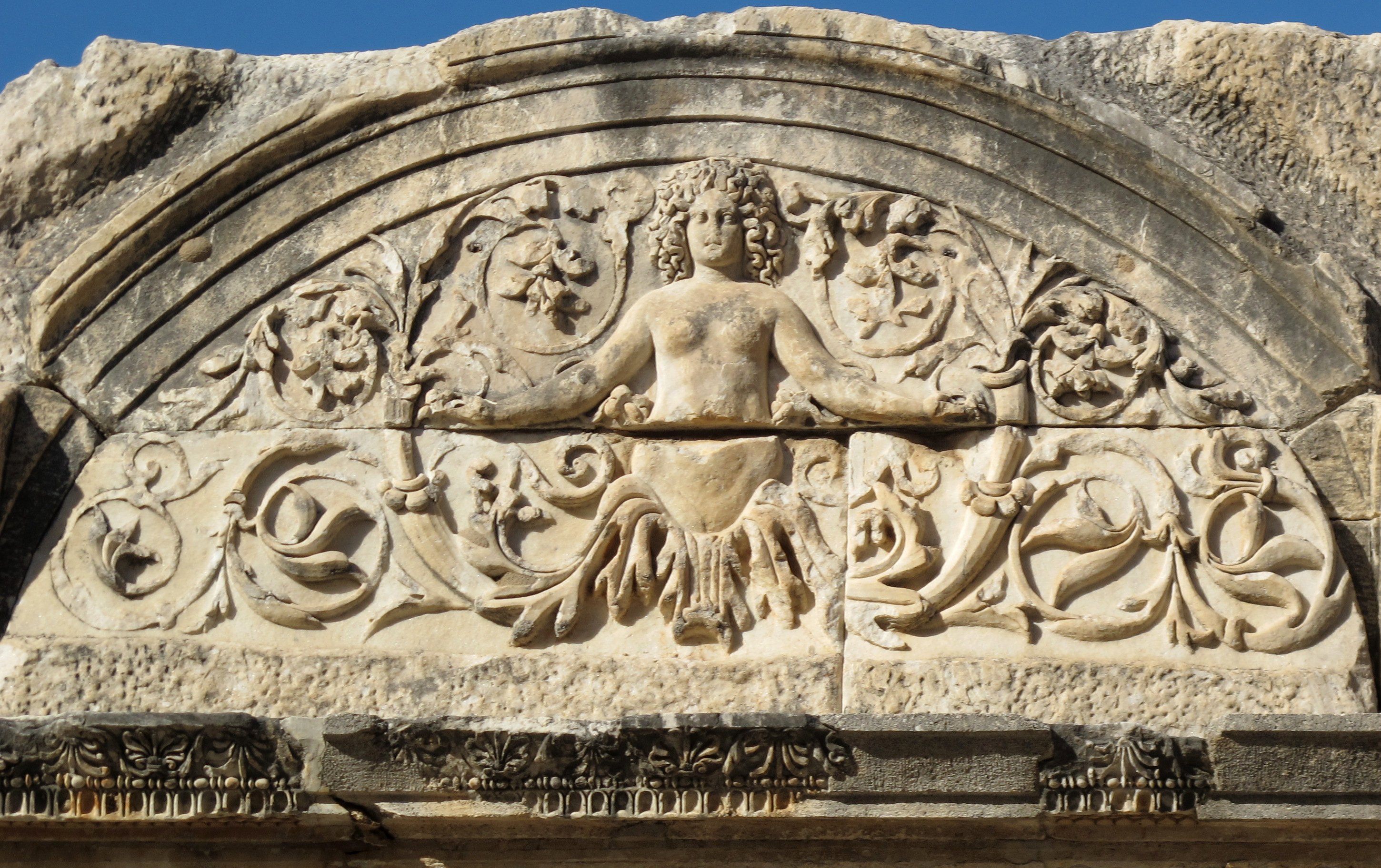 Efeso, tempio di adriano 11 medusa